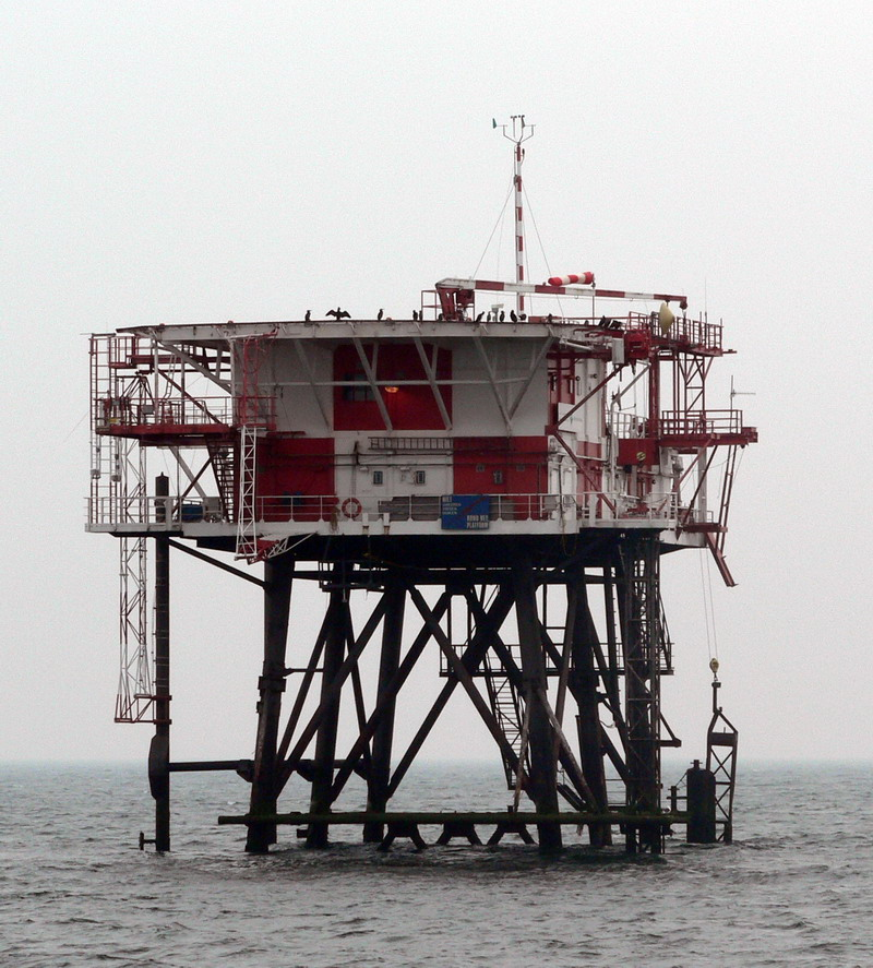 REM eiland